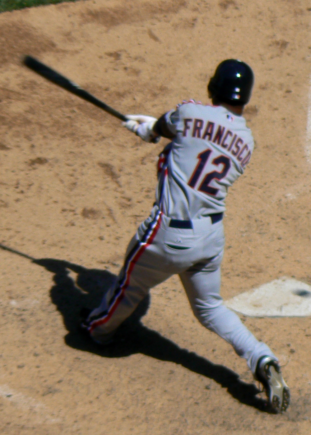 Ben Francisco